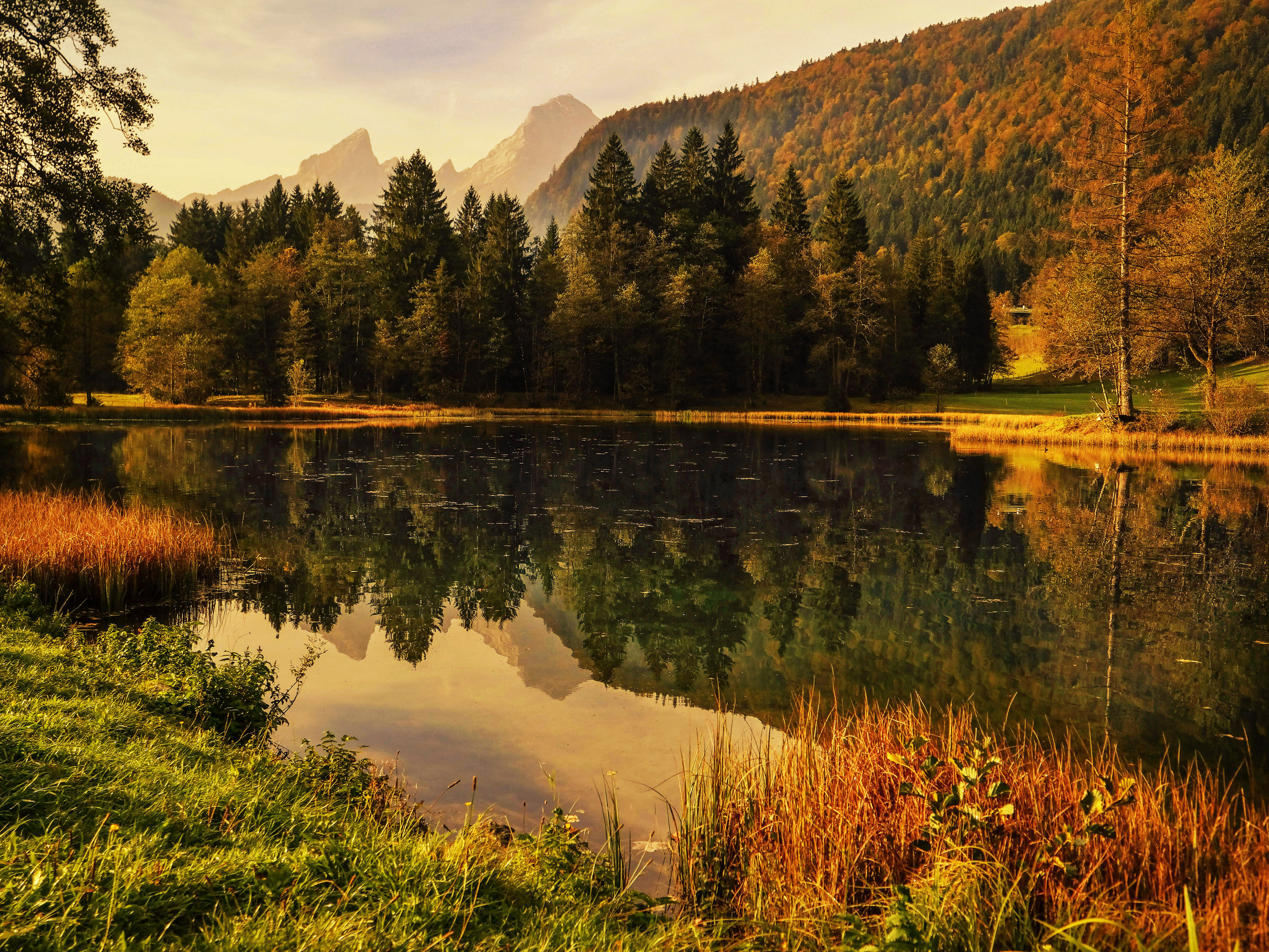 Der Böcklweiher im Herbst mit Blick auf den Watzmann.